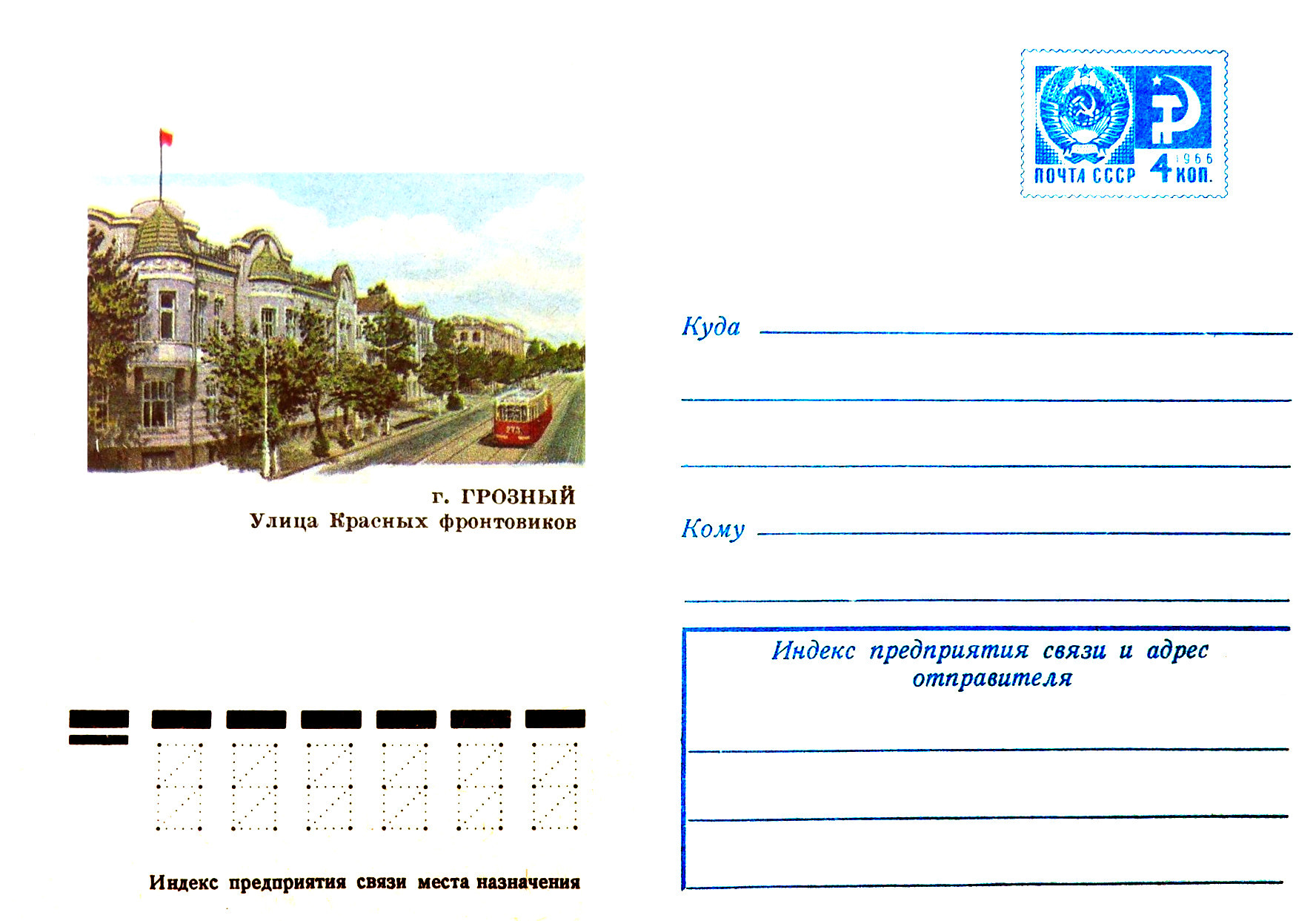 Грозный. Улица Красных фронтовиков. Конверт СССР. 1976